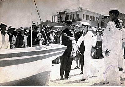 השקת הסירה הראשונה של זבולון בחוף תל אביב על ידי זאב ז'בוטינסקי, 1928 1928 (כיתוב המקור).